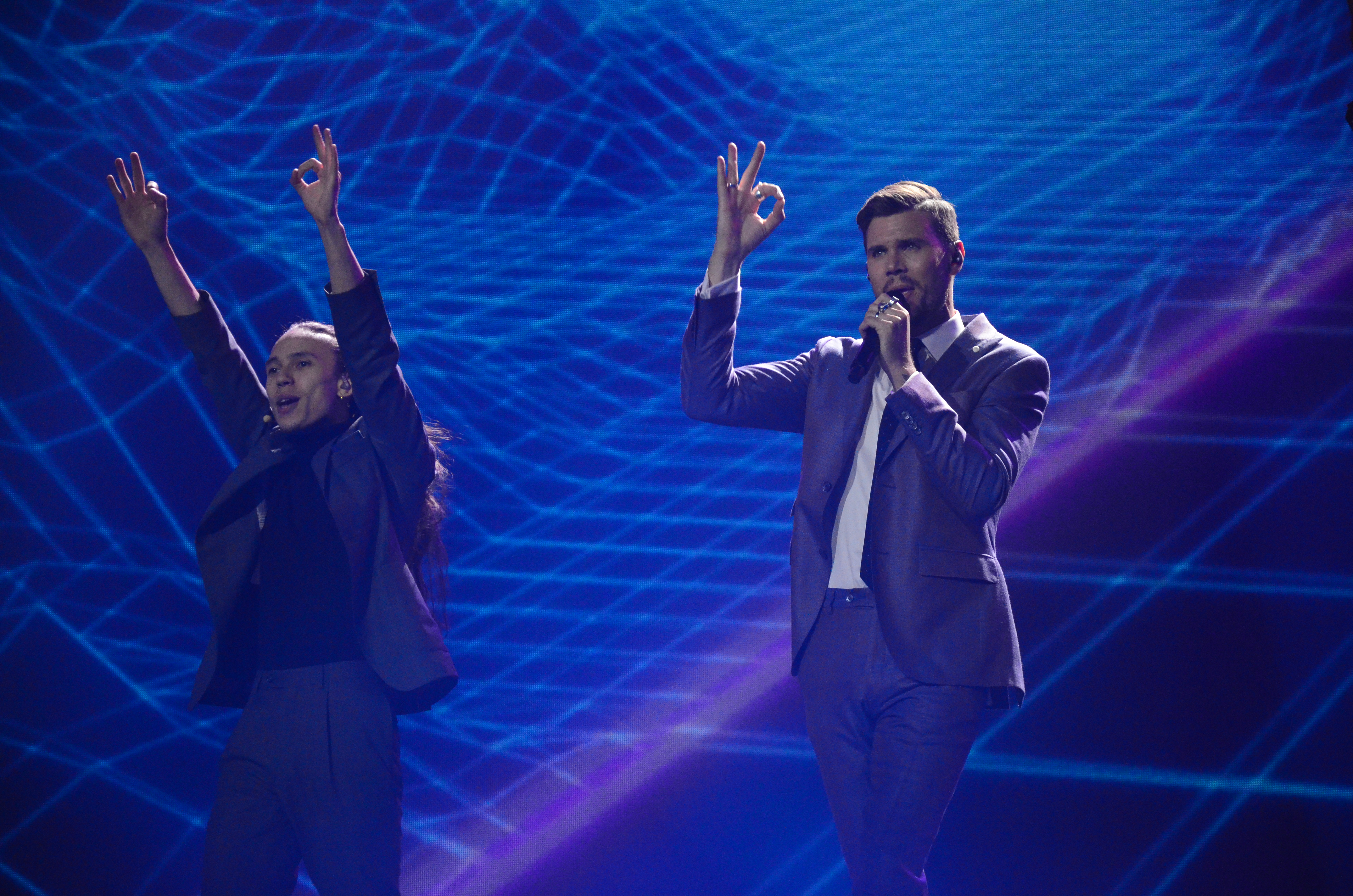 12 травня. Генеральна репетиція фіналу Євробачення 2017. Robin Bengtsson (Sweden).